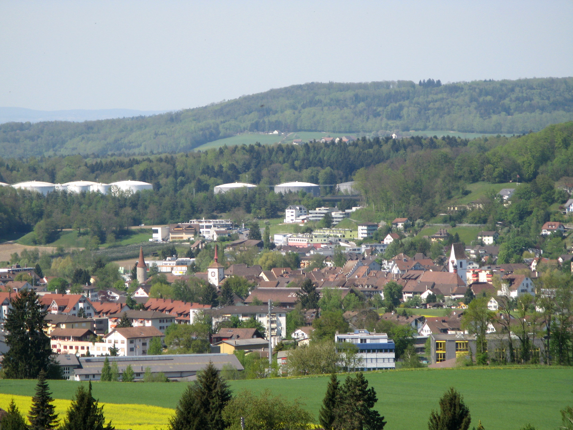 Ansicht von Mellingen, aufgenommen oberhalb von Tägerig